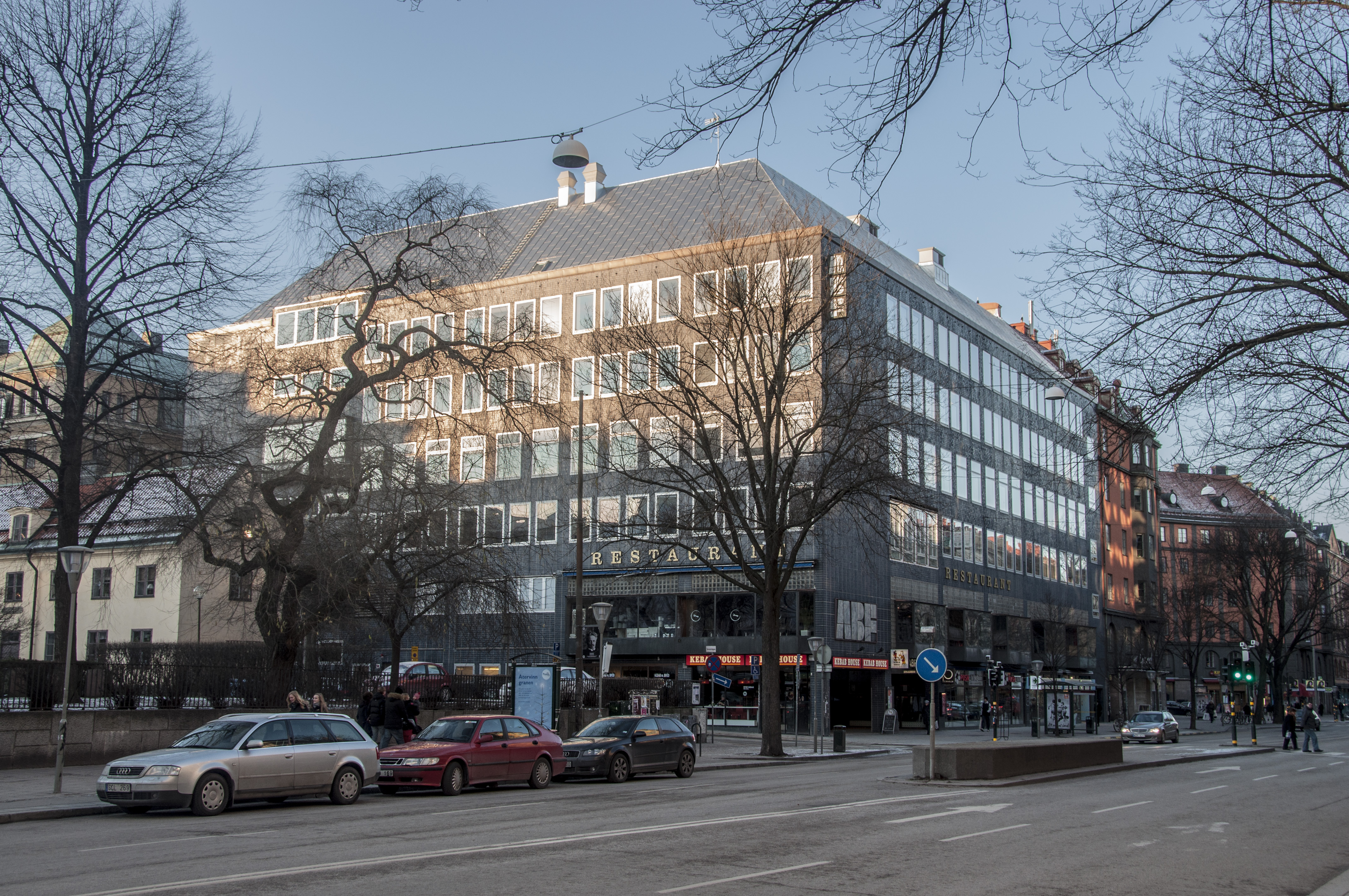 ABF-huset, Sankta Anna 6, Sveavägen 41-43, Nybyggnadsår 1958 - 1964, Anders Hagthorpe (Byggmästare) S. Entrepenad AB (Byggmästare) Stockholms Stad (Byggherre) Zimdahls Arkitektkontor (Arkitekt)